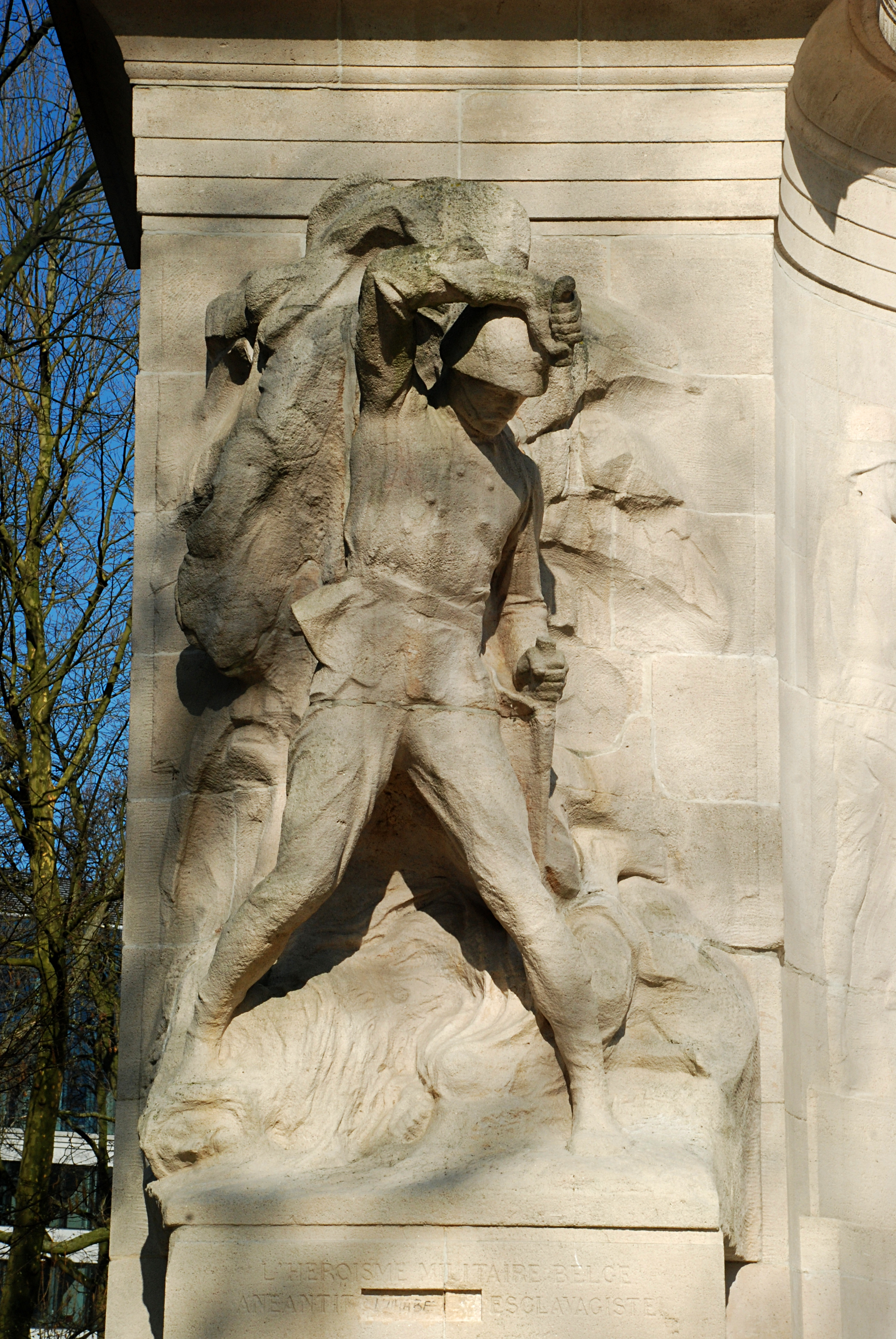 Belgique - Bruxelles - Cinquantenaire - Monument aux pionniers belges au Congo (Thomas Vinçotte)